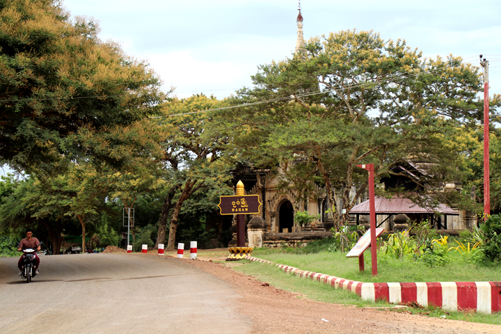 မြန်မာဘာသာ: ပုဂံမြို့ဟောင်း (သရပါတံခါးအနီး)